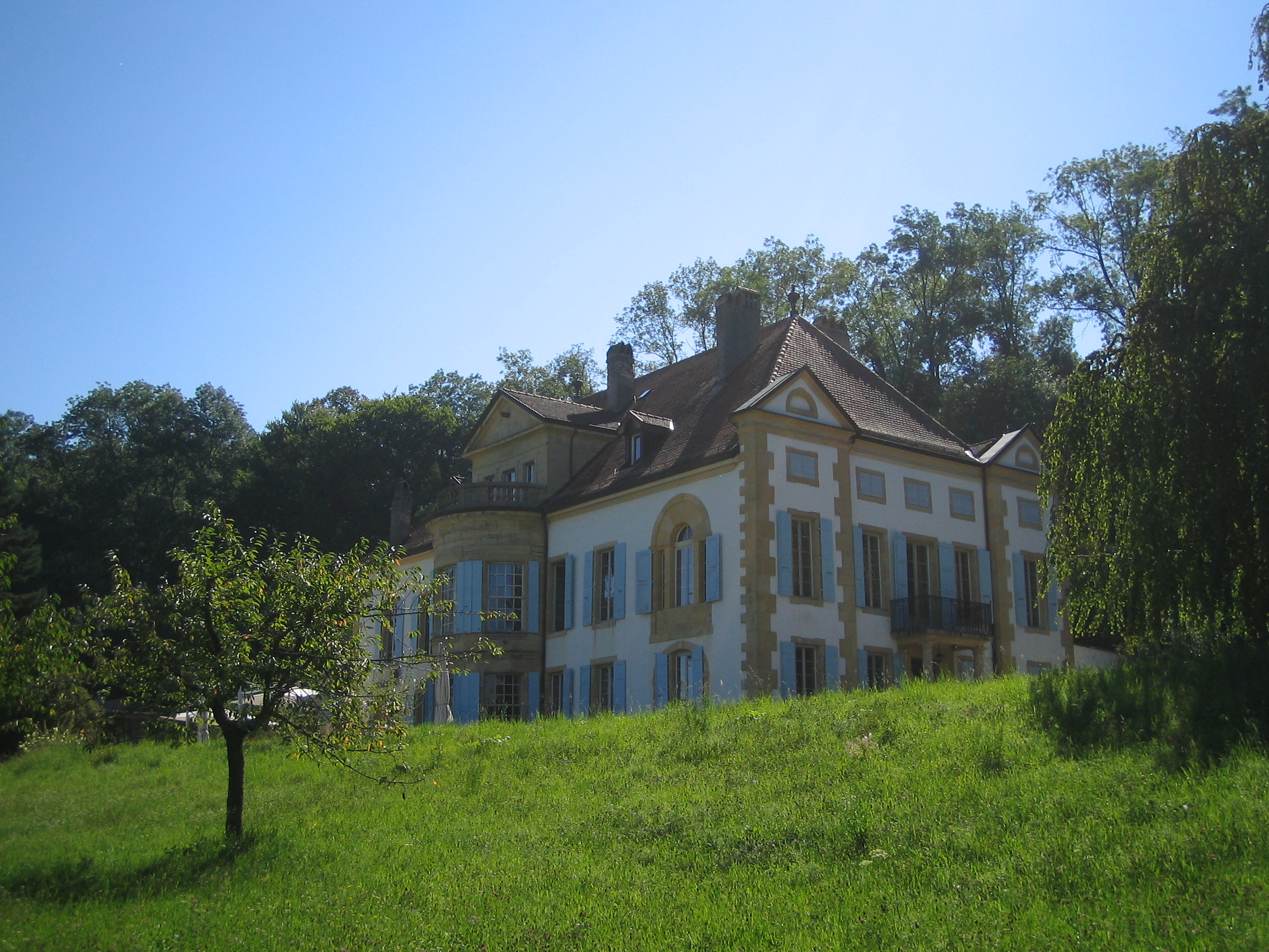 Château de Champittet